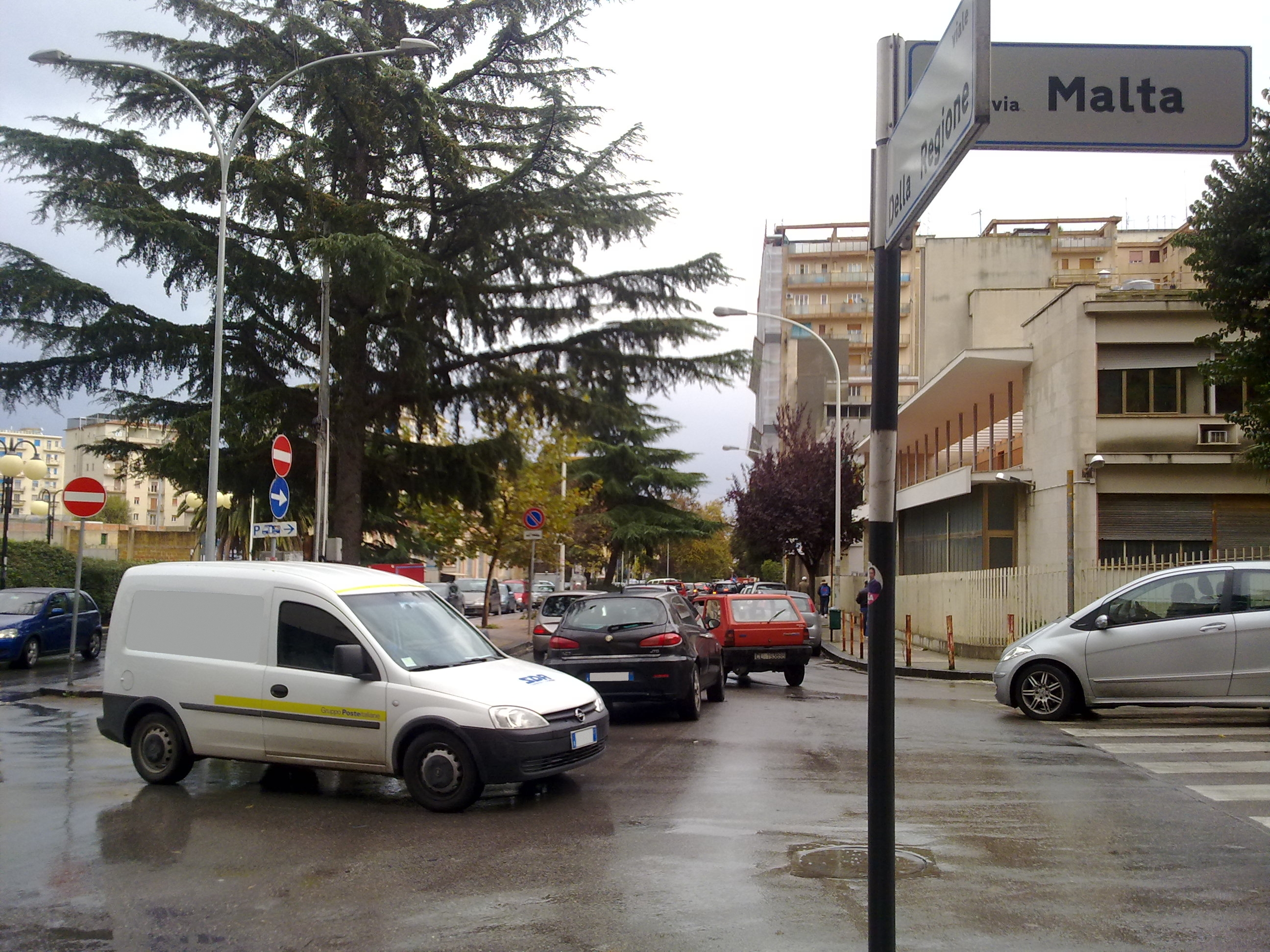 Viale Della Regione (Caltanissetta)